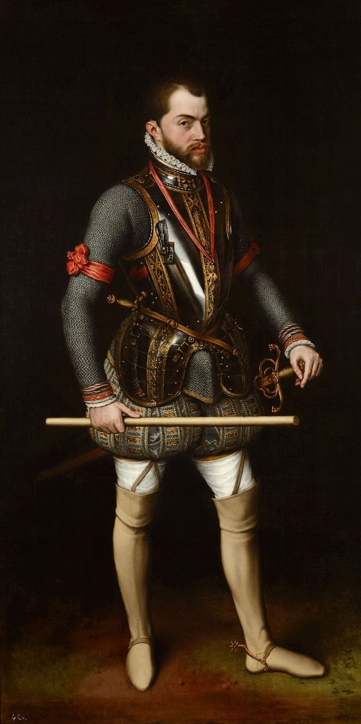 Retrato del rey Felipe II de España (1527-1598).